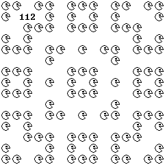 Kopierwelt im Spiel des Leben. 1 mittiges Pac-Man-Motiv nach 112 Zyklen.